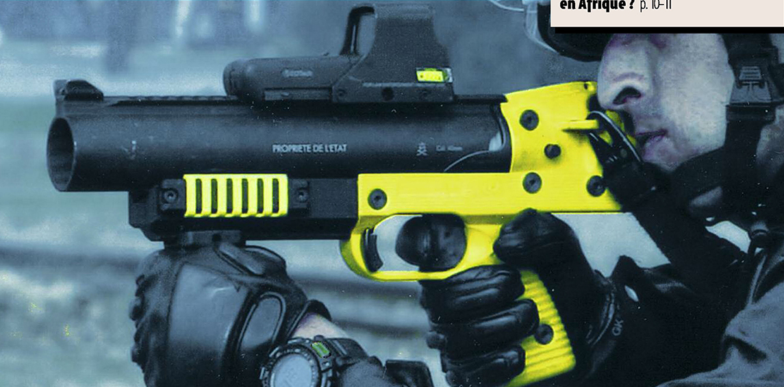 Octobre 2009 Couverture d'Alternative libertaire, mensuel anarcho-communiste français, organe de presse d'Alternative libertaire (1991-2019) puis de l'Union communiste libertaire (à partir de 2019).